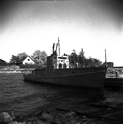 HMS Djärv förtöjd år 1949. IDENTIFIKATIONSNUMMER V1544